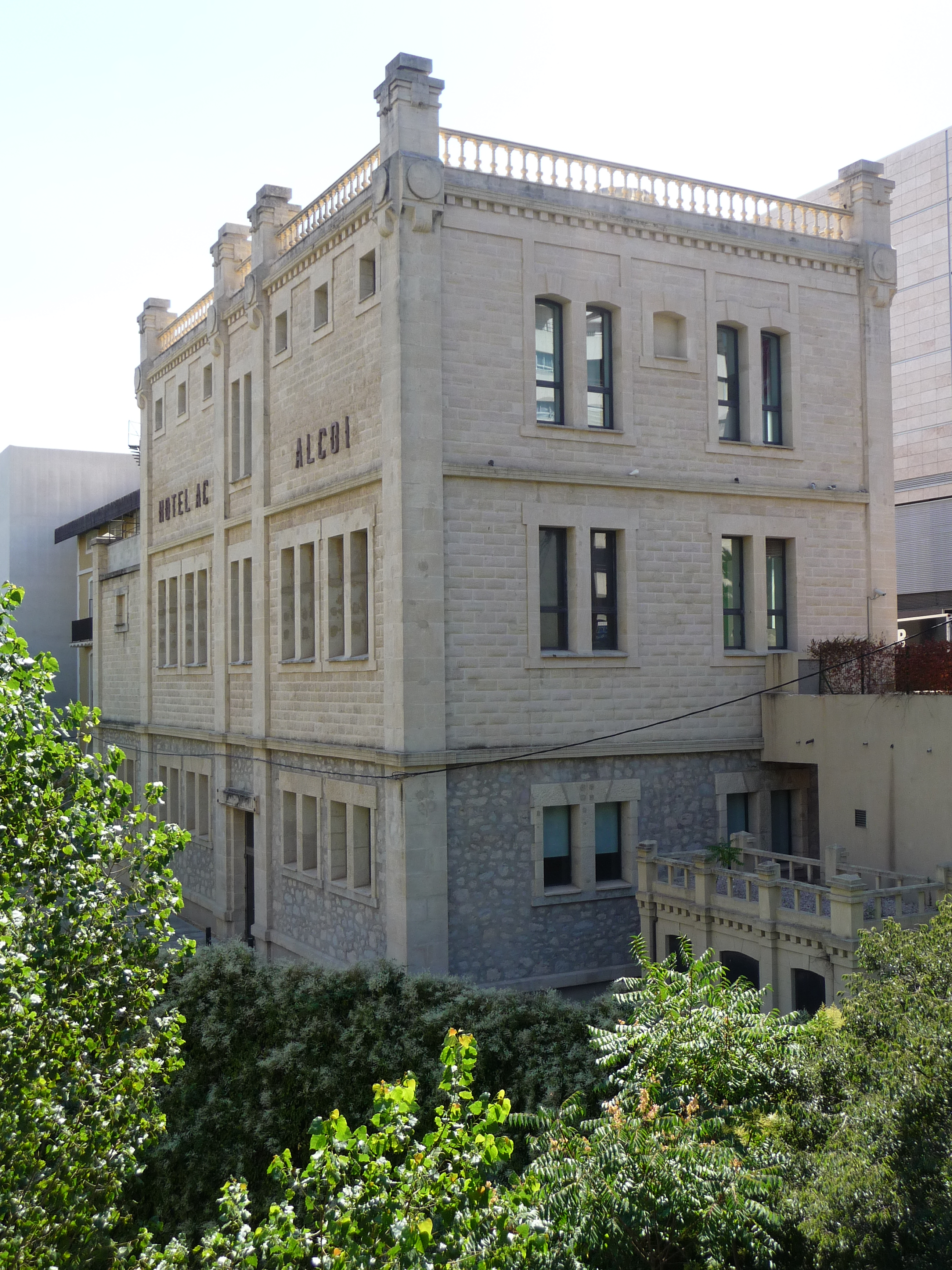 Antiga Hidroelèctrica Espanyola (Alcoi) 27.009-038.